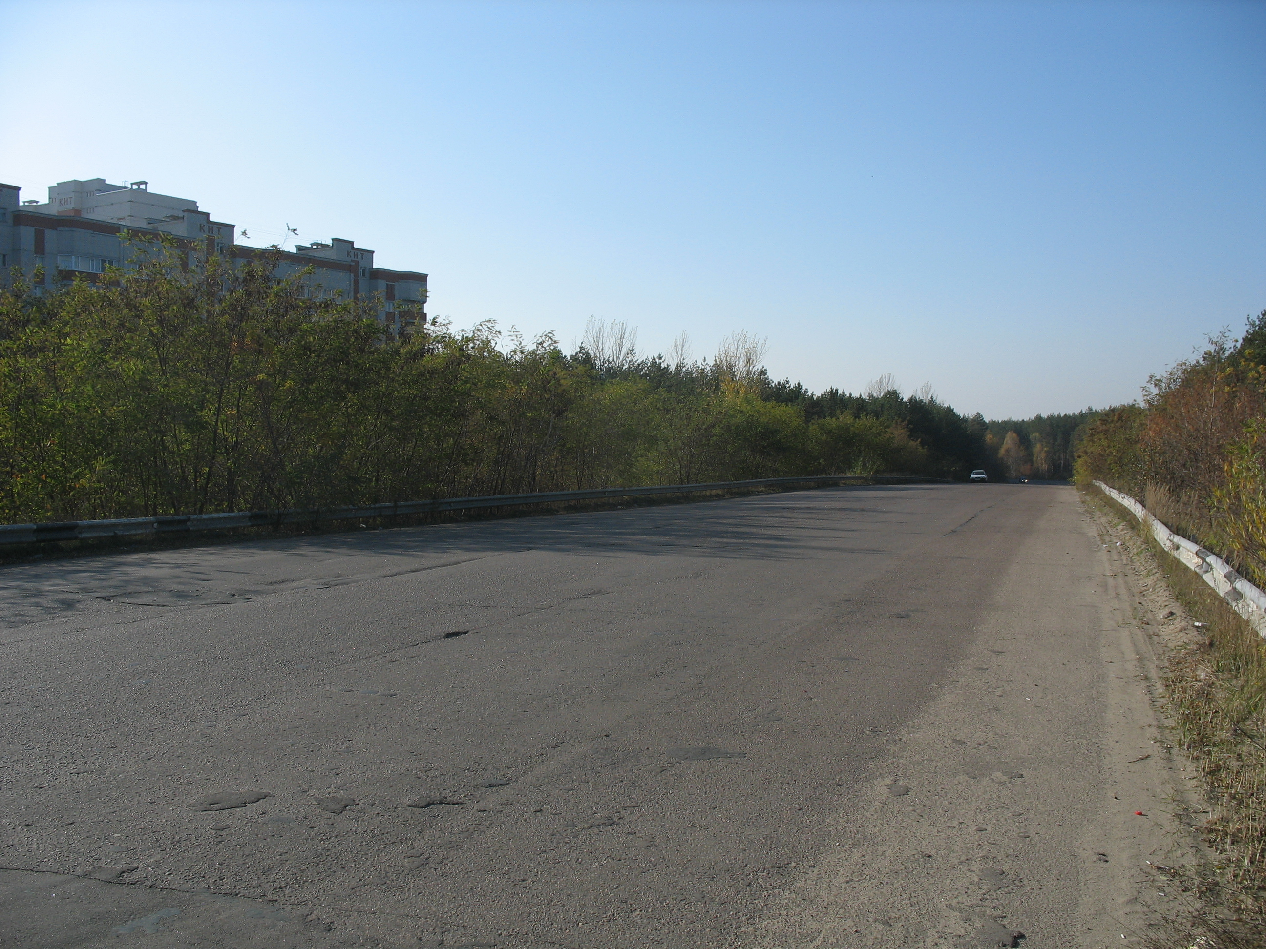 Окружная дорога Воронежа (начало)